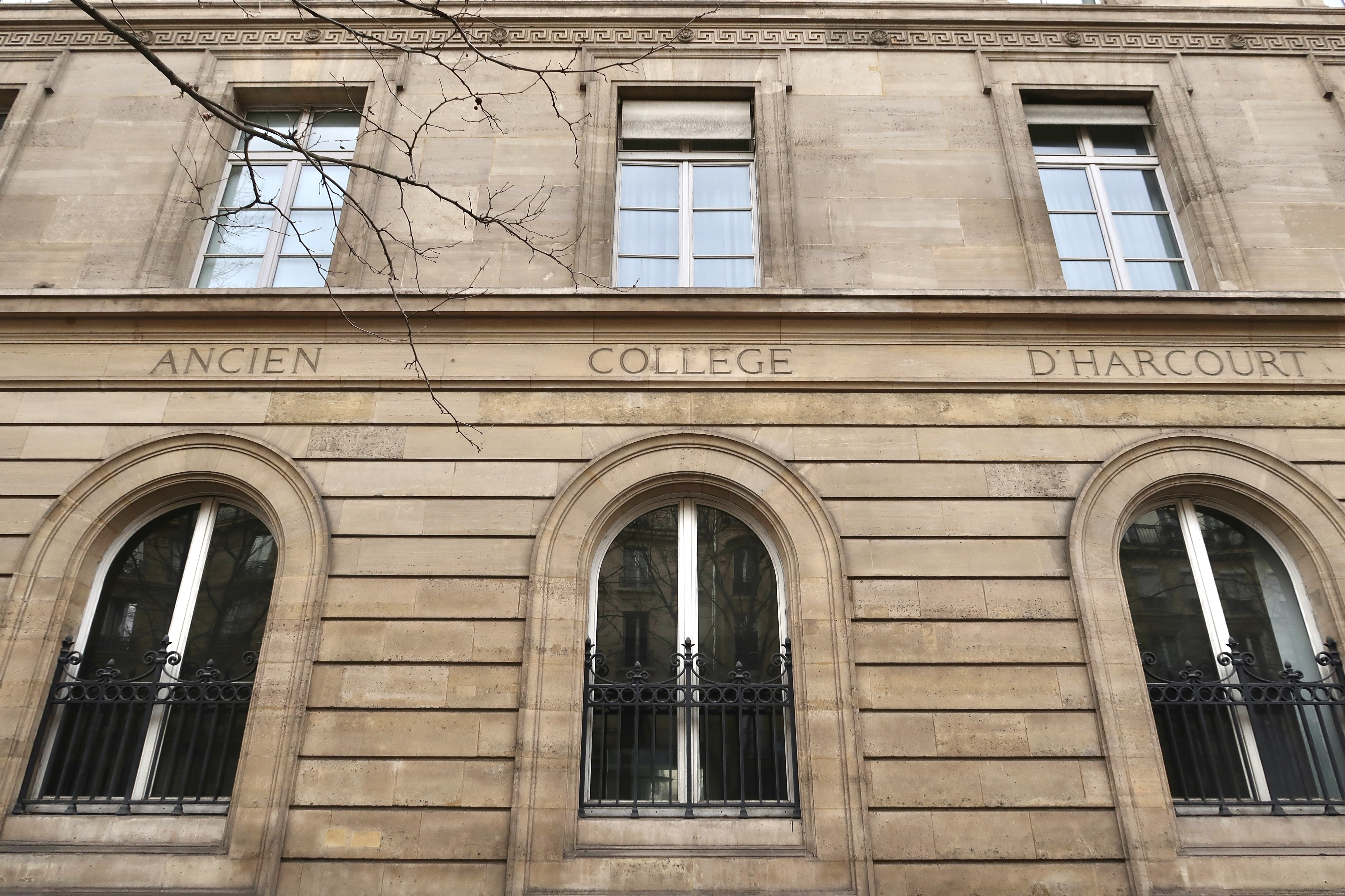 Inscription « ancien collège d'Harcourt », façade du lycée Saint-Louis, boulevard Saint-Michel (Paris, 6e).